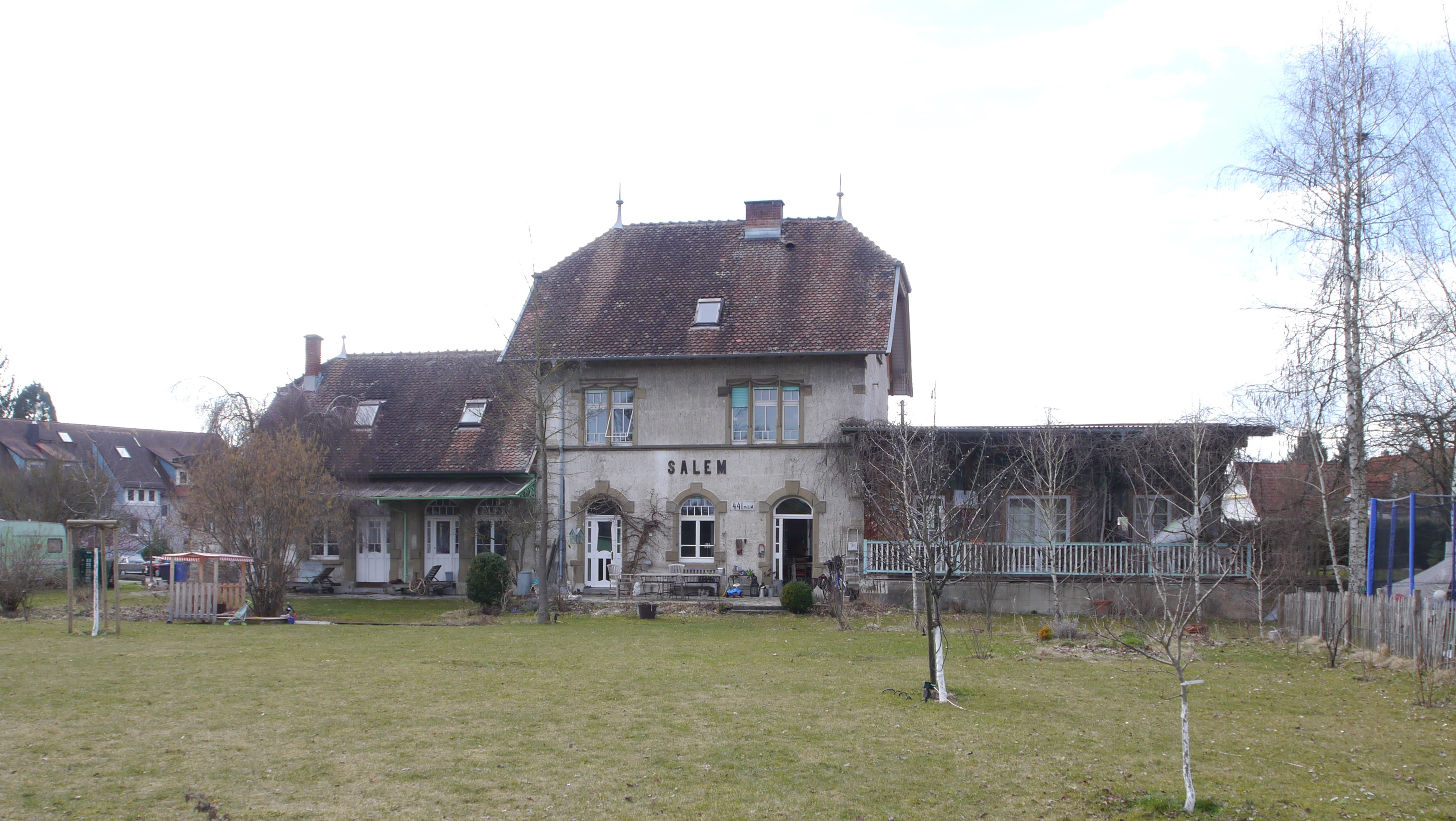 Überbleibsel der Bahnstrecke Mimmenhausen-Neufrach–Frickingen. Zu sehen ist das Bahnhofsgebäude Salem Nord in Salem Neufrach